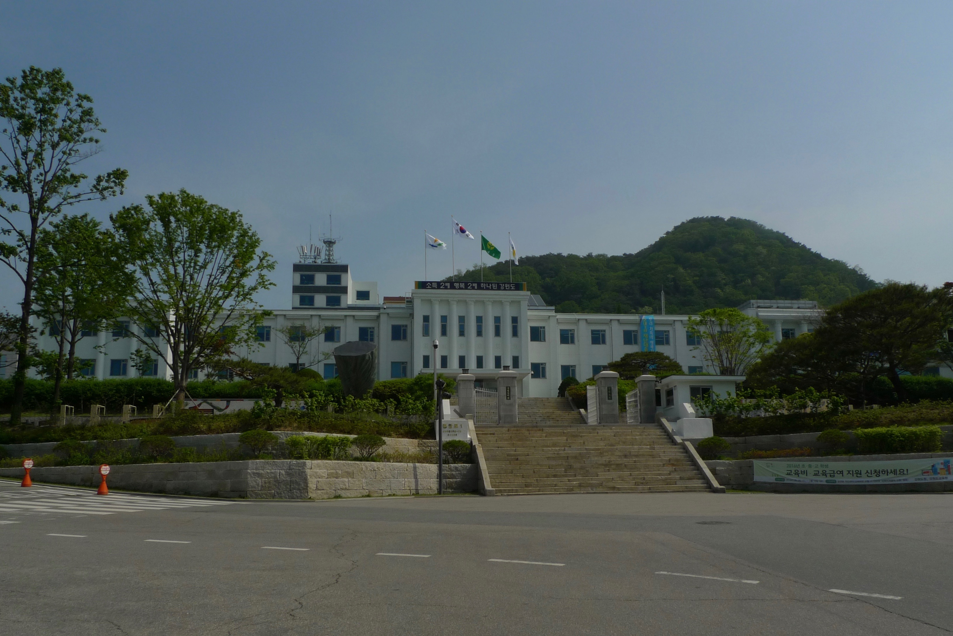 江原道庁の外観写真